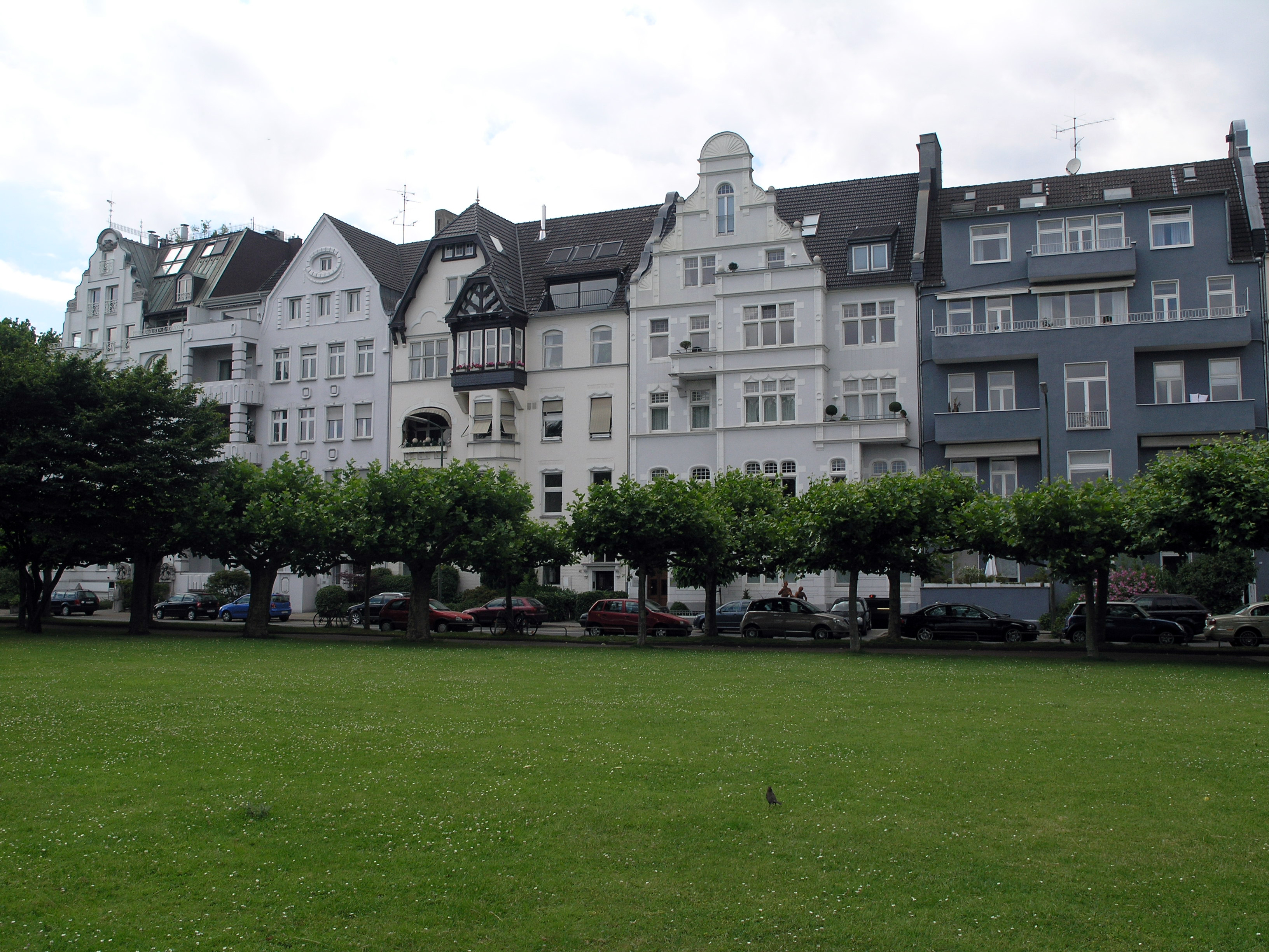 Северный Рейн-Вестфалия, Дюссельдорф - Оберкассель